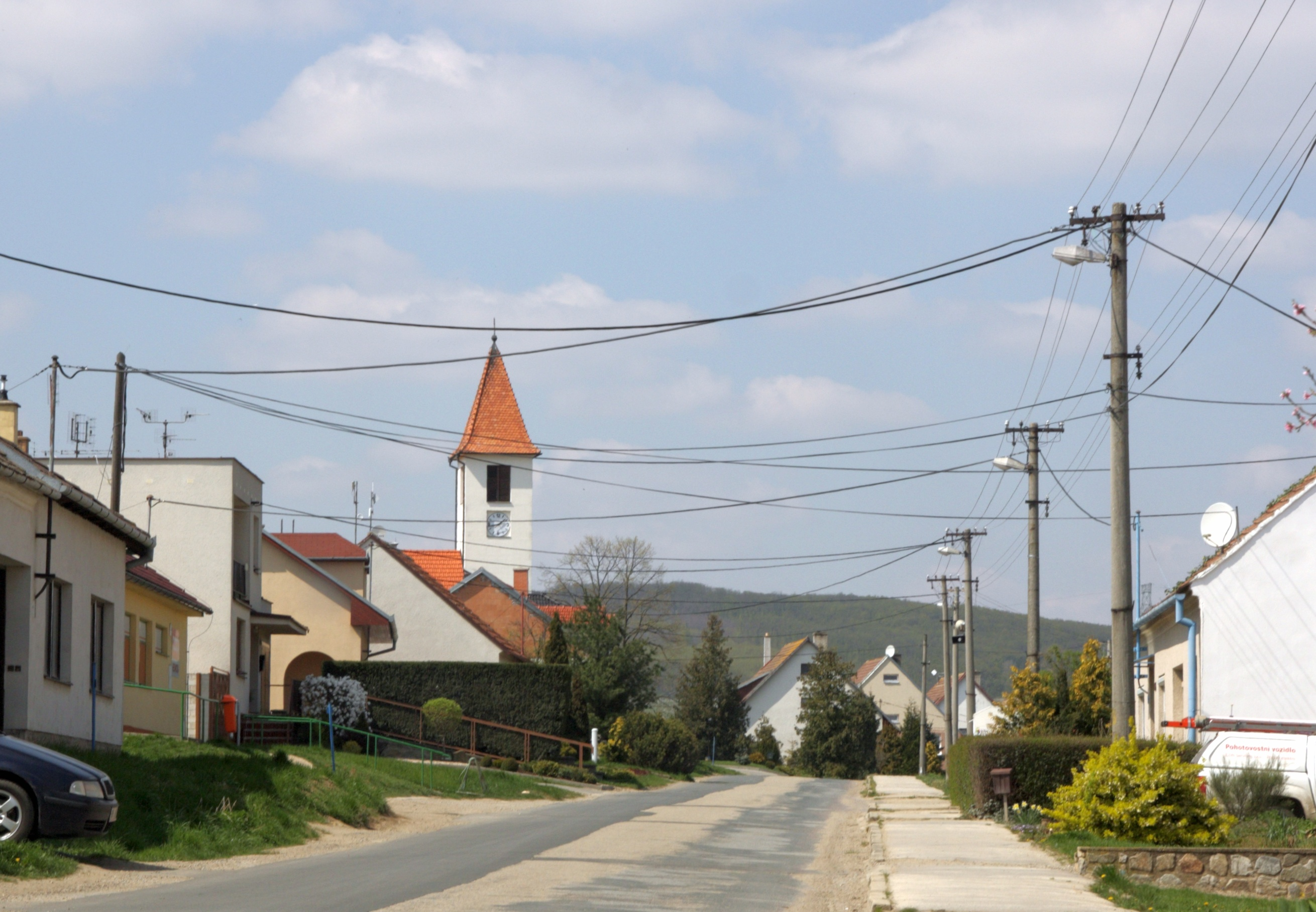 Jezeřany-Maršovice - hlavní silnice v Jezeřanech.